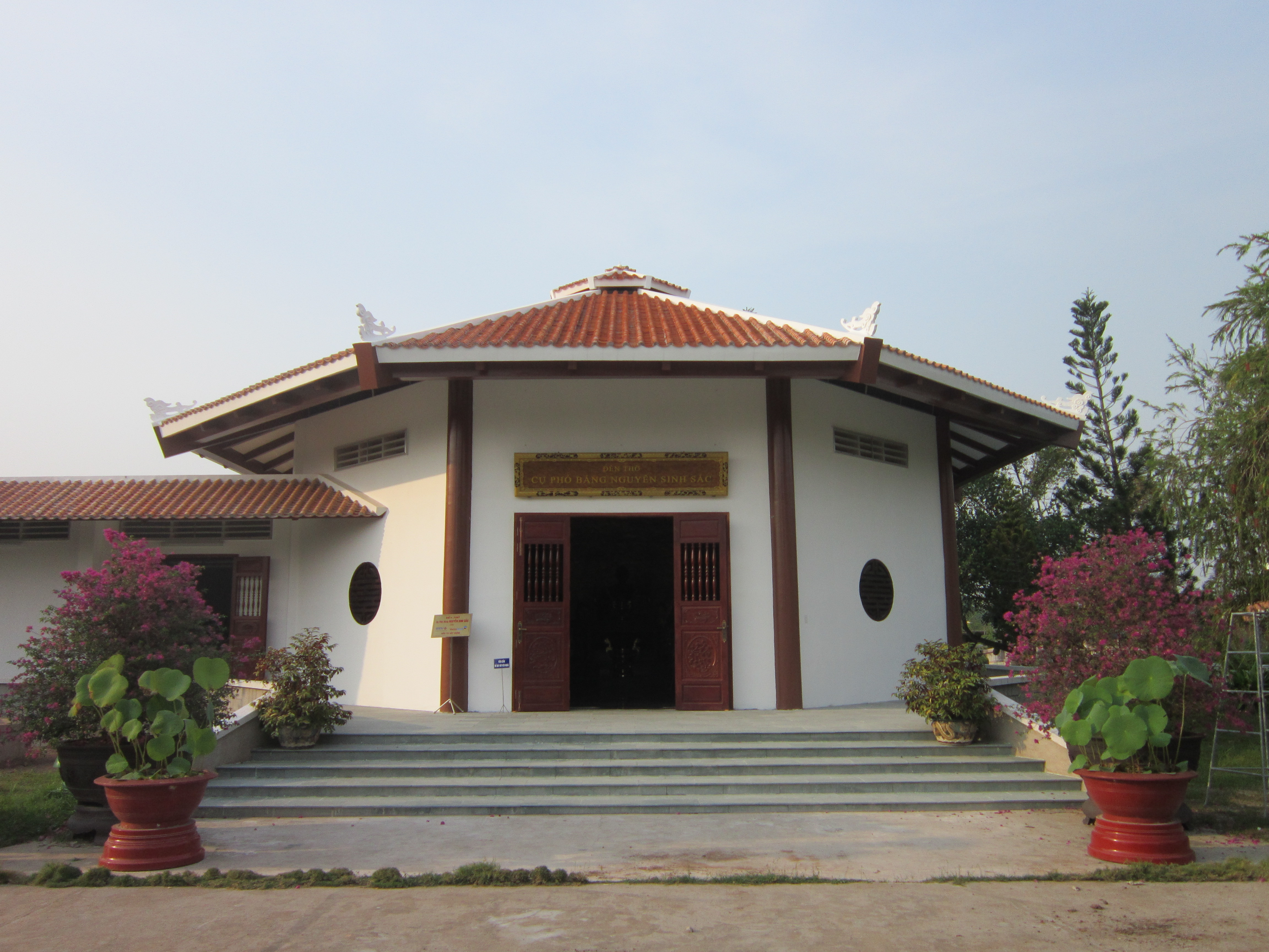 Đền thờ Nguyễn Sinh Sắc (1862–1929) trong Khu di tích Nguyễn Sinh Sắc tọa lạc số 123/1 Phạm Hữu Lầu, thuộc phường 4, thành phố Cao Lãnh, tỉnh Đồng Tháp, Việt Nam.